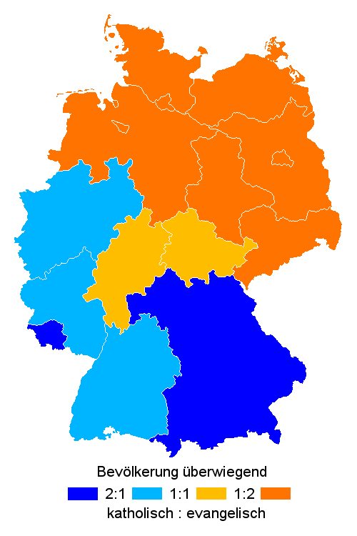 Vorwiegende christliche Konfession in den einzelnen Bundesländern.